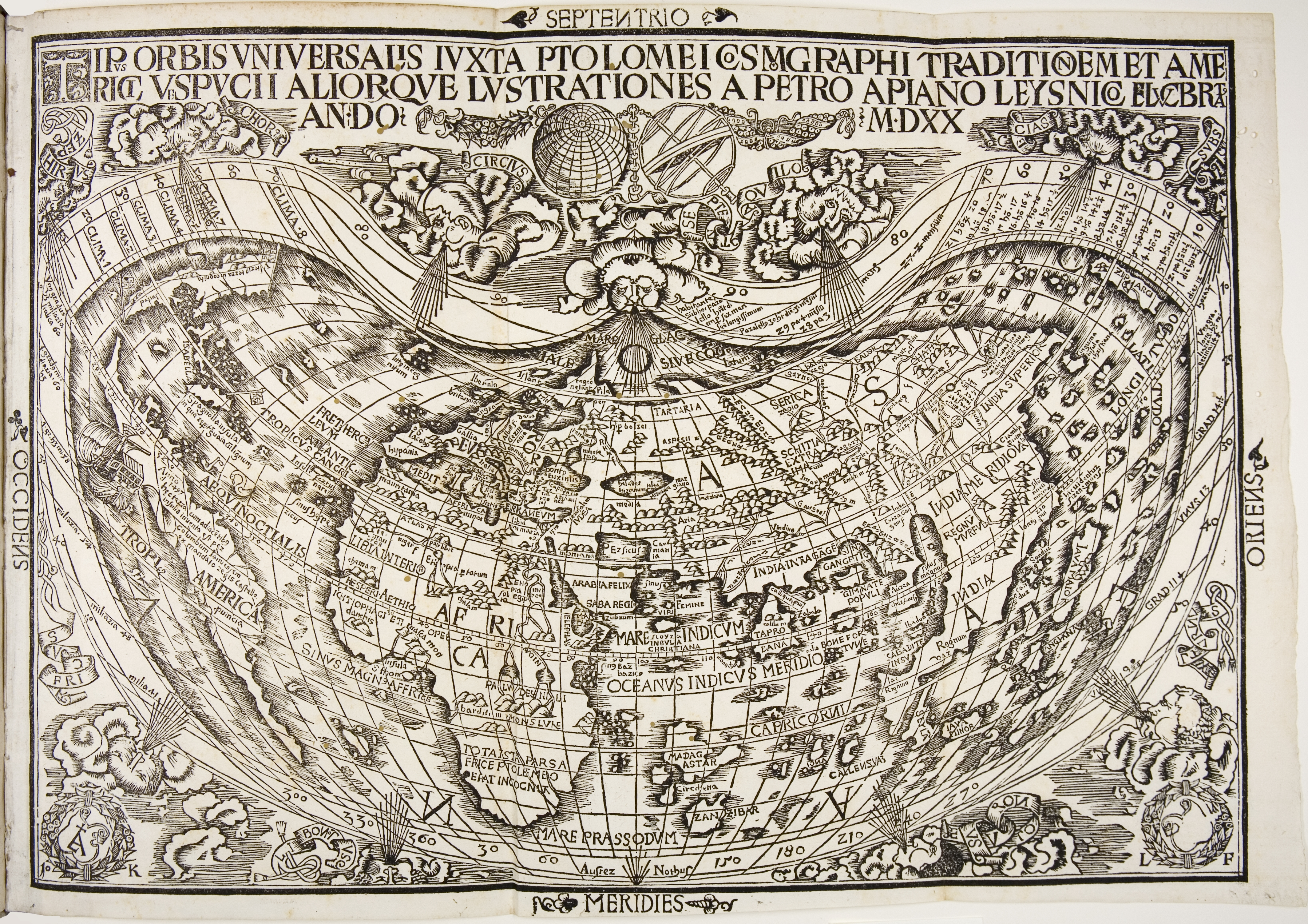 Weltkarte mit Windbläsern. Holzschnitt, aus: Peter Apian, Tipus Orbis Universalis Iuxta Ptolomei Cosmographi Traditionem Et Americi Vespucii Aliorque [...], Wien: Johannes Singren für Lucas Alantse 1520. Stadtbibliothek Mainz, Stb Ink 871